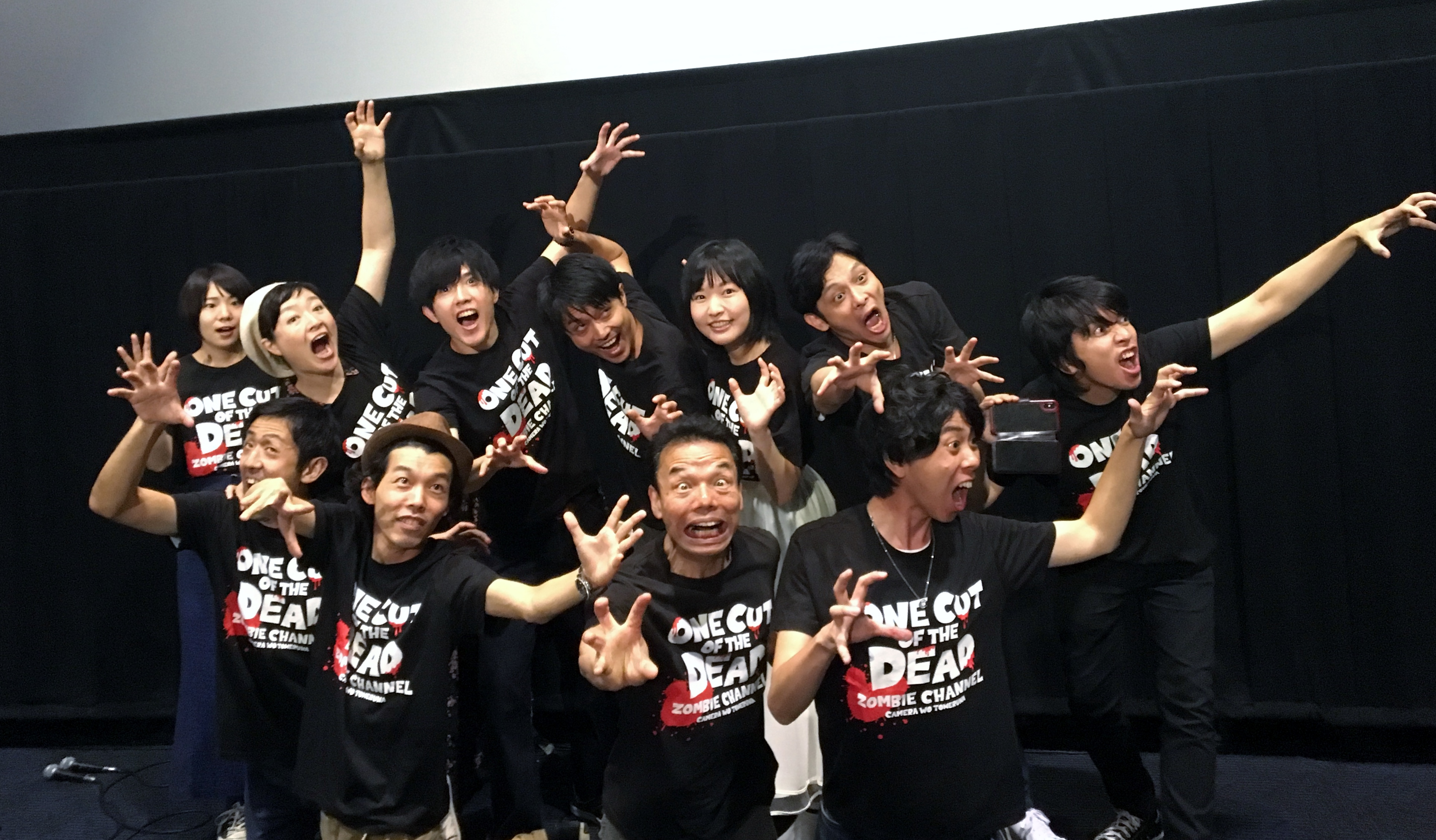 「カメラを止めるな!」チネチッタ川崎での舞台挨拶（2018年7月14日） 後列左から、真魚、しゅはまはるみ、長屋和彰、大沢真一郎、浅森咲希奈、山口友和、曽我真臣、 前列左から、濱津隆之、上田慎一郎、細井学、市原洋